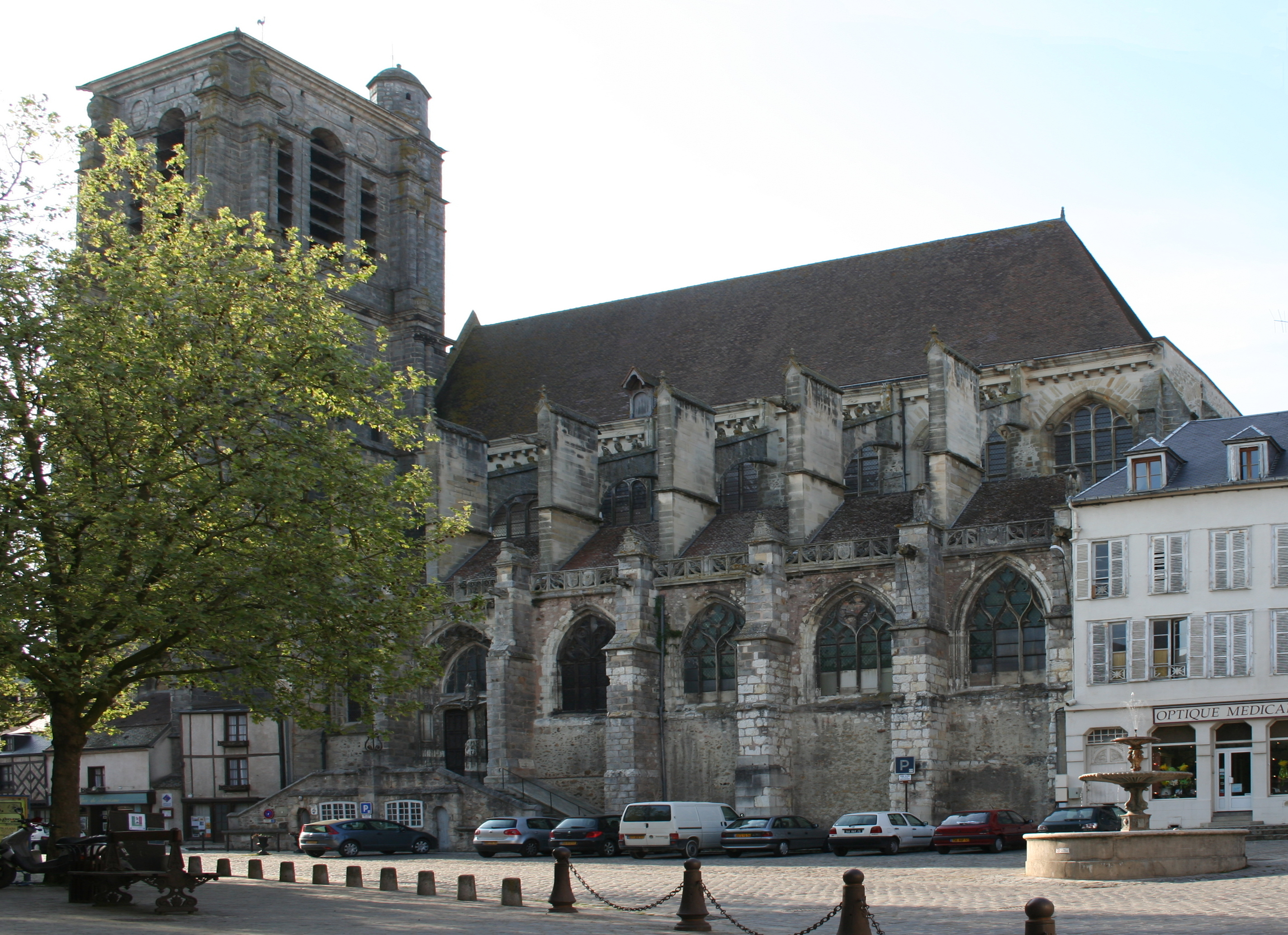 Place de la République à Sézanne (Marne), avec l'église Saint-Denis